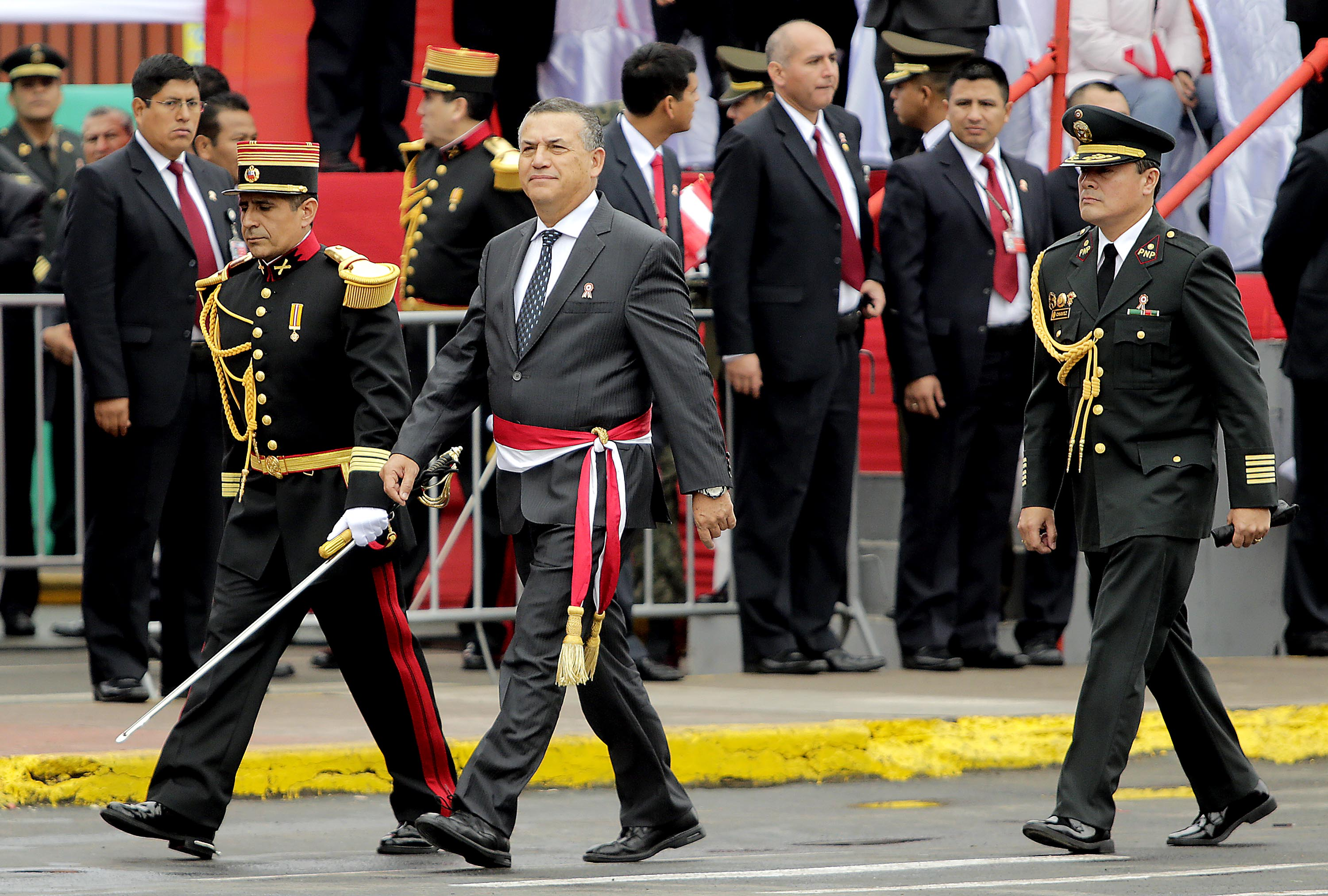 El Presidente de la República, Ollanta Humala Tasso, y el ministro de Defensa, Pedro Cateriano Bellido, encabezaron la Gran Parada y Desfile Cívico Militar por el 193º Aniversario de la Proclamación de la Independencia del Perú. Con un marco impresionante de personas a lo largo de la avenida Brasil, la celebración patriótica contó con la presencia de la presidente del Consejo de Ministros, Ana Jara Velásquez, y de los titulares del Poder Judicial y del Congreso, Enrique Mendoza y Ana María Solórzano, respectivamente.